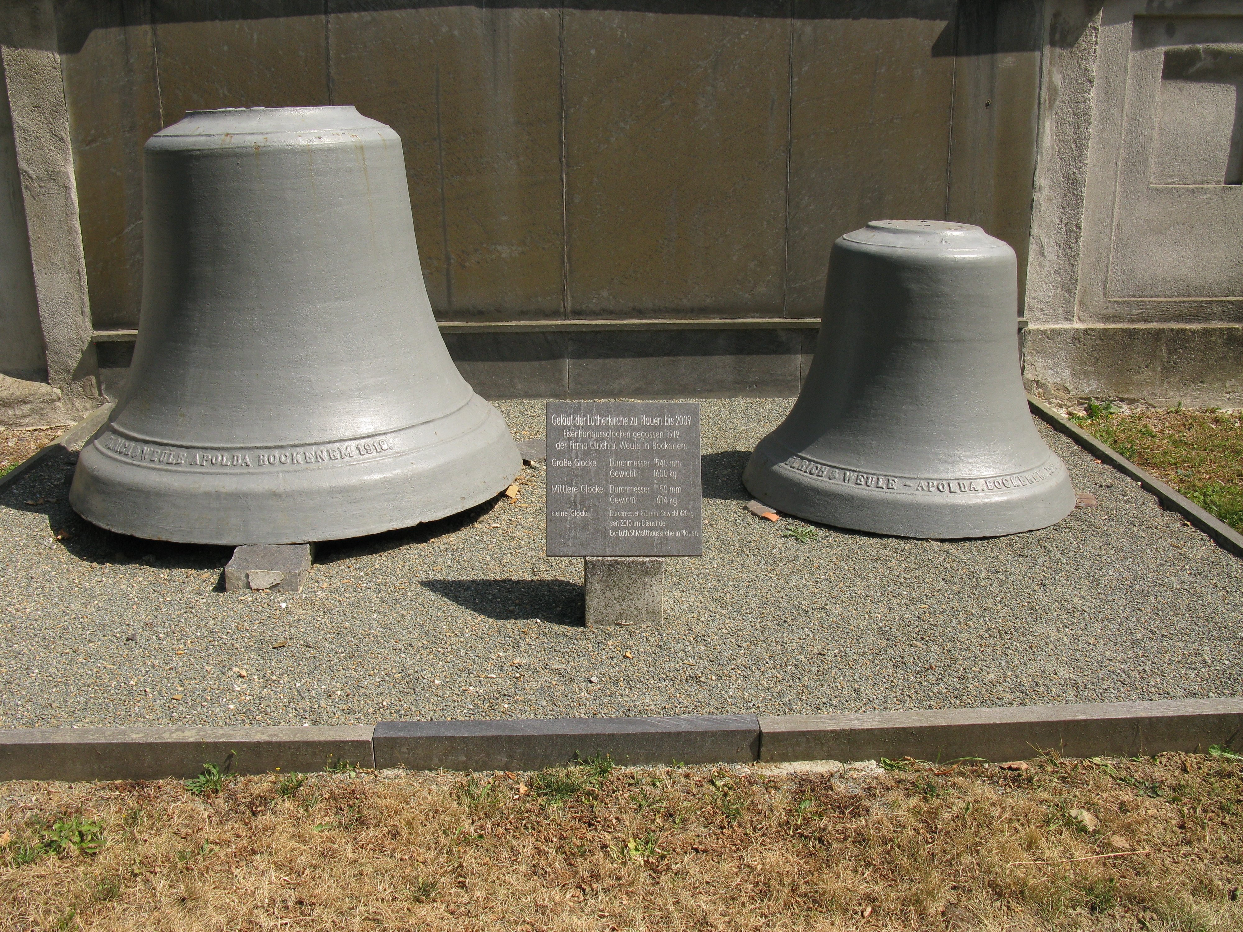 Plauen, Friedhof I - stillgelegtes Geläut der Lutherkirche